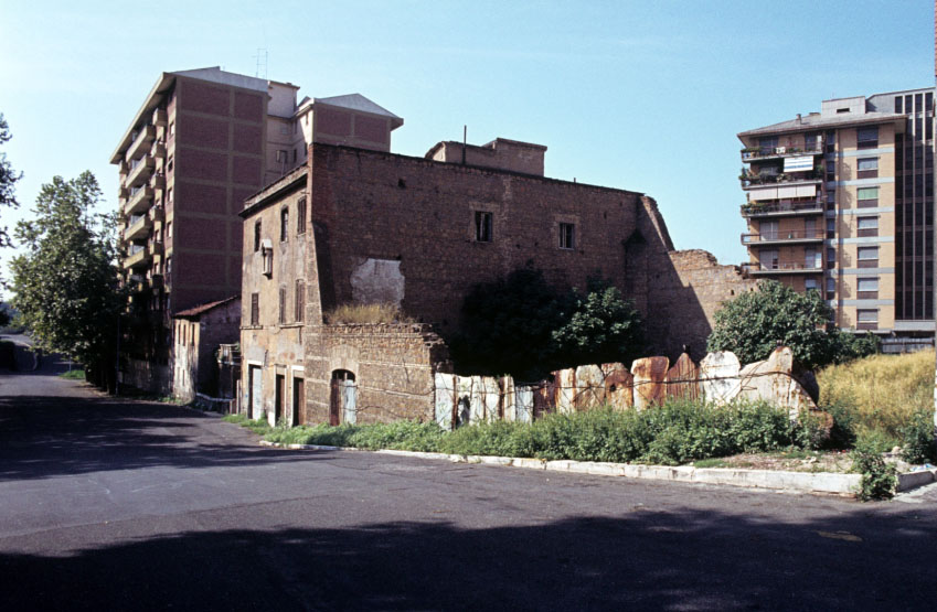 Roma, via dei Cessati Spiriti a Roma nel 1983. Sulla facciata dell'edificio semidiroccato si vede ancora l'edicola della Madonna grazie alla quale - si diceva - gli spiriti cessarono di frequentare la strada (e di derubare i clienti dell'osteria che si trovava lì). La via costituiva un tratto del tracciato della via Appia Nuova fino agli anni 1940.